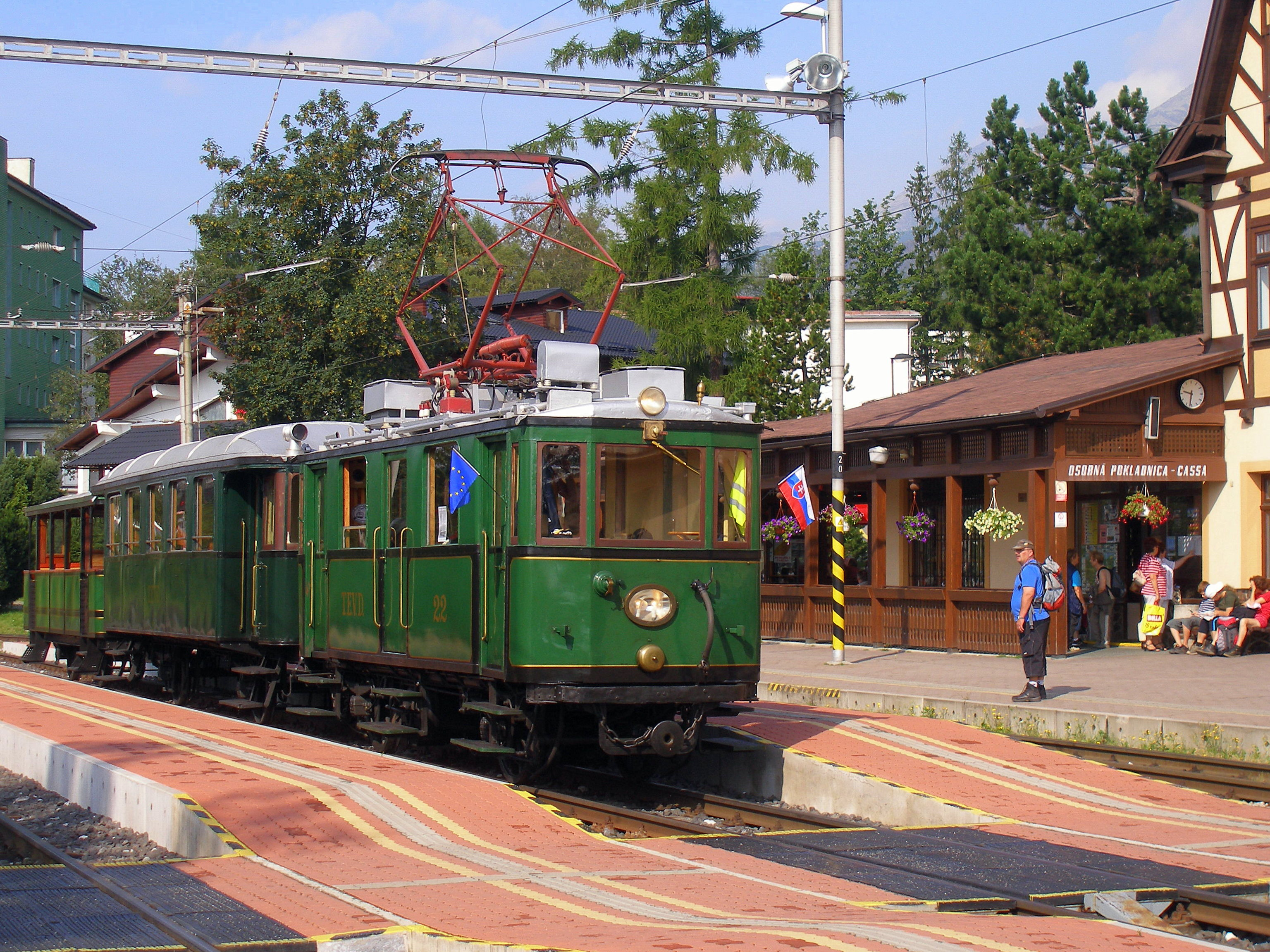 Tatranská osada Starý Smokovec, mesto Vysoké Tatry.